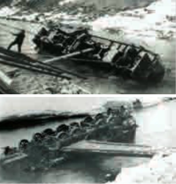 Eisenbahnunfall vom 19. März 1937 bei Zernez: Aufwendige Bergungsarbeiten der Lok Ge 4/6 391 aus dem Inn